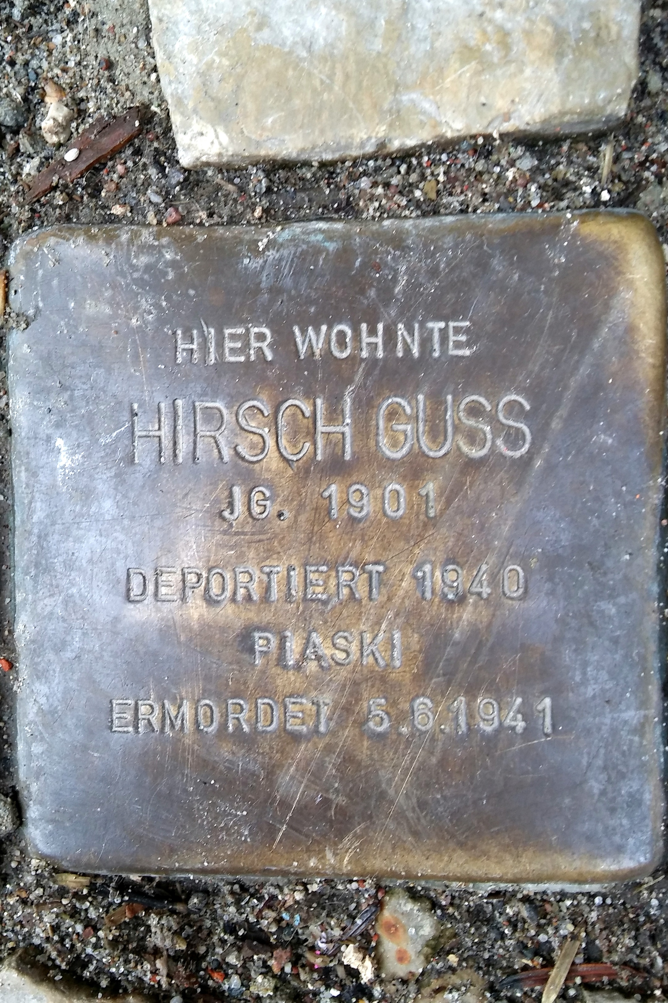 Stralsund, Badenstraße 41, Stolperstein Hirsch Guss (2017-02-22)